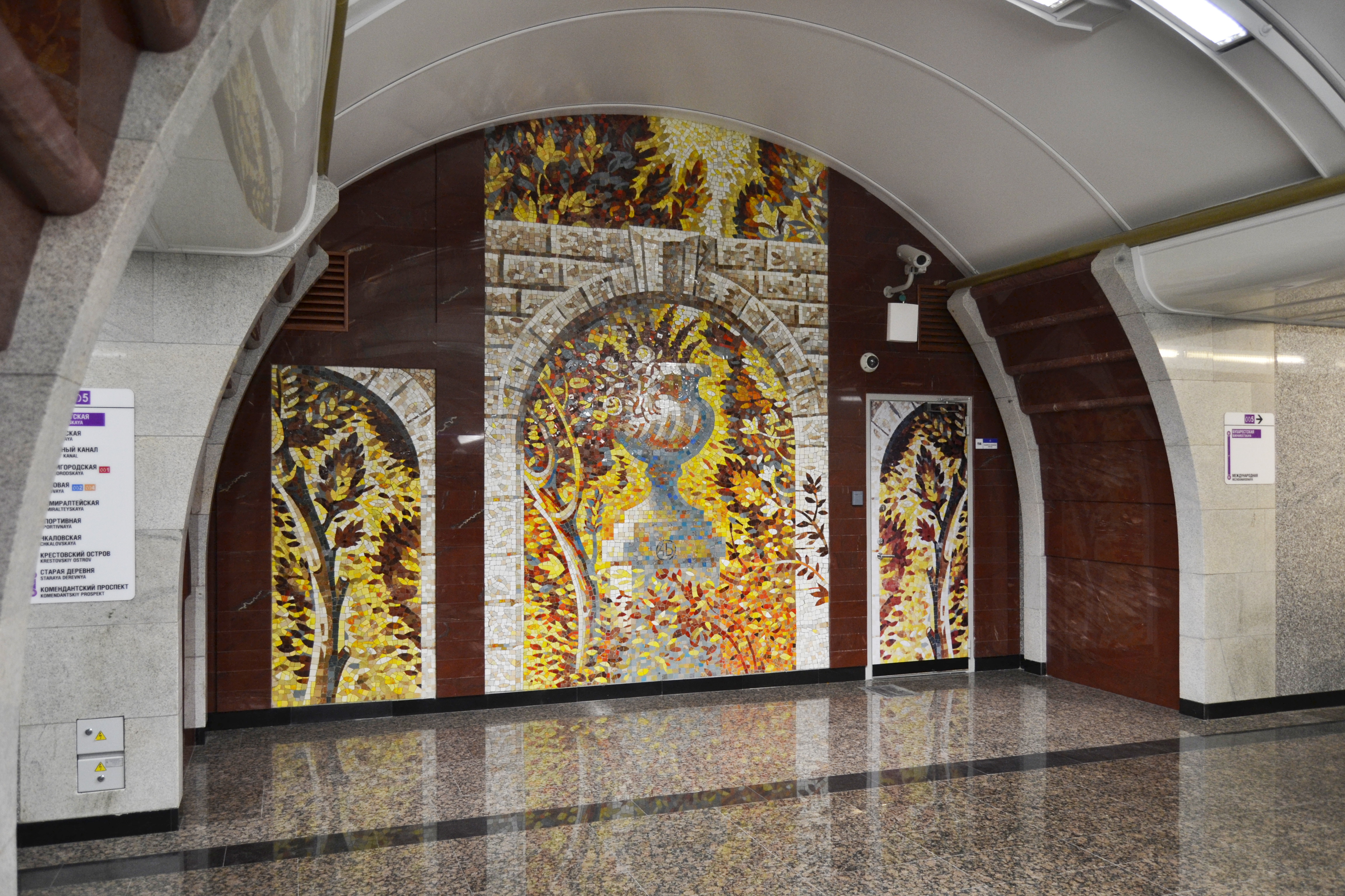 Мозаичное панно в центральном зале станции метро "Бухарестская"